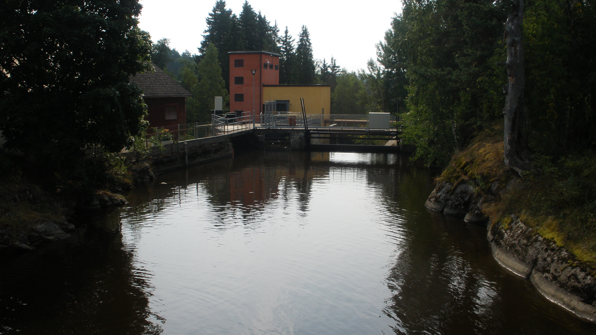 Halkia - Halkiankosken Voimalaitos - Hydroelectric Power Plant